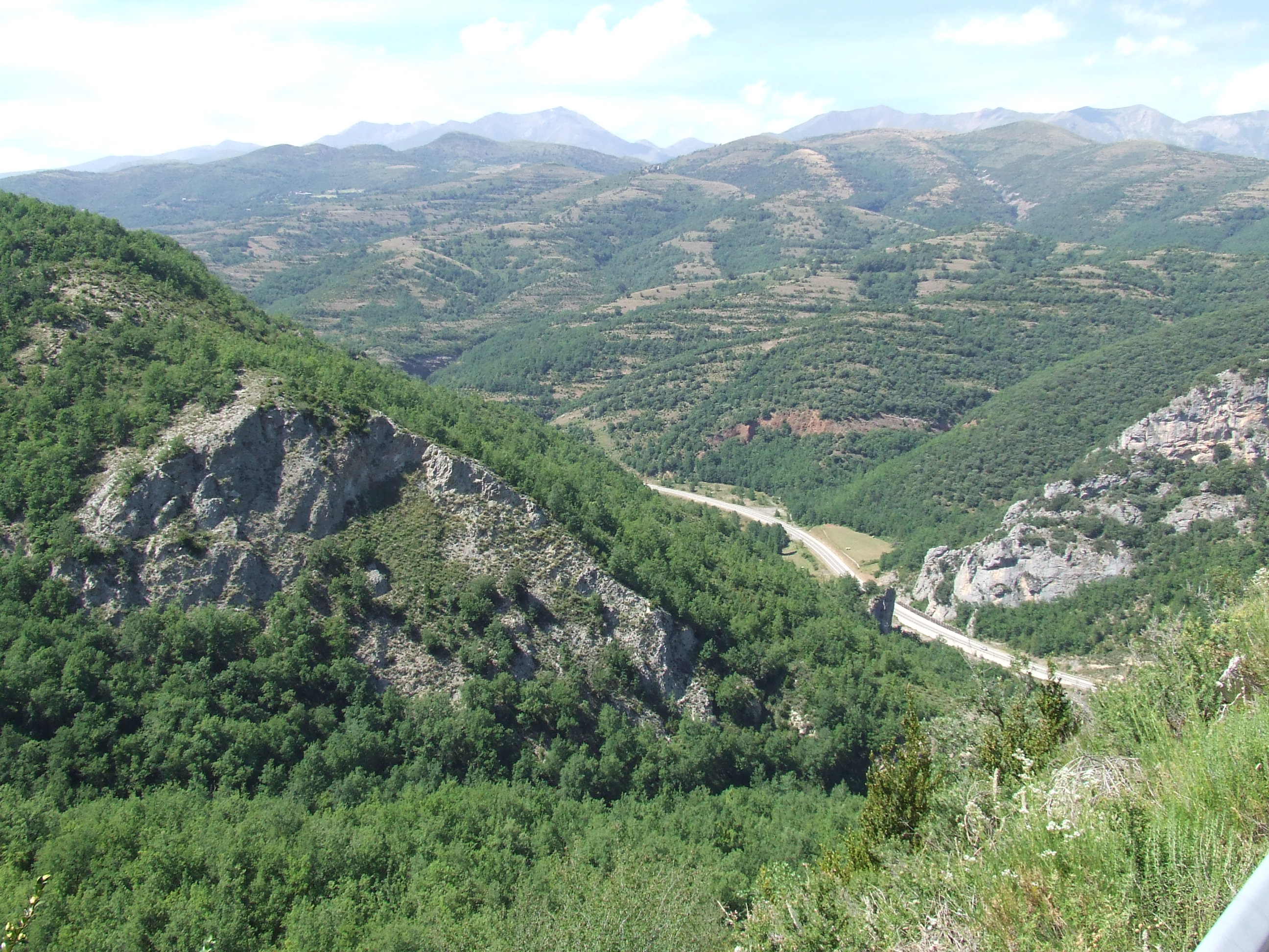 La Vall de Bellera (Sarroca de Bellera i Senterada, Pallars Jussà)